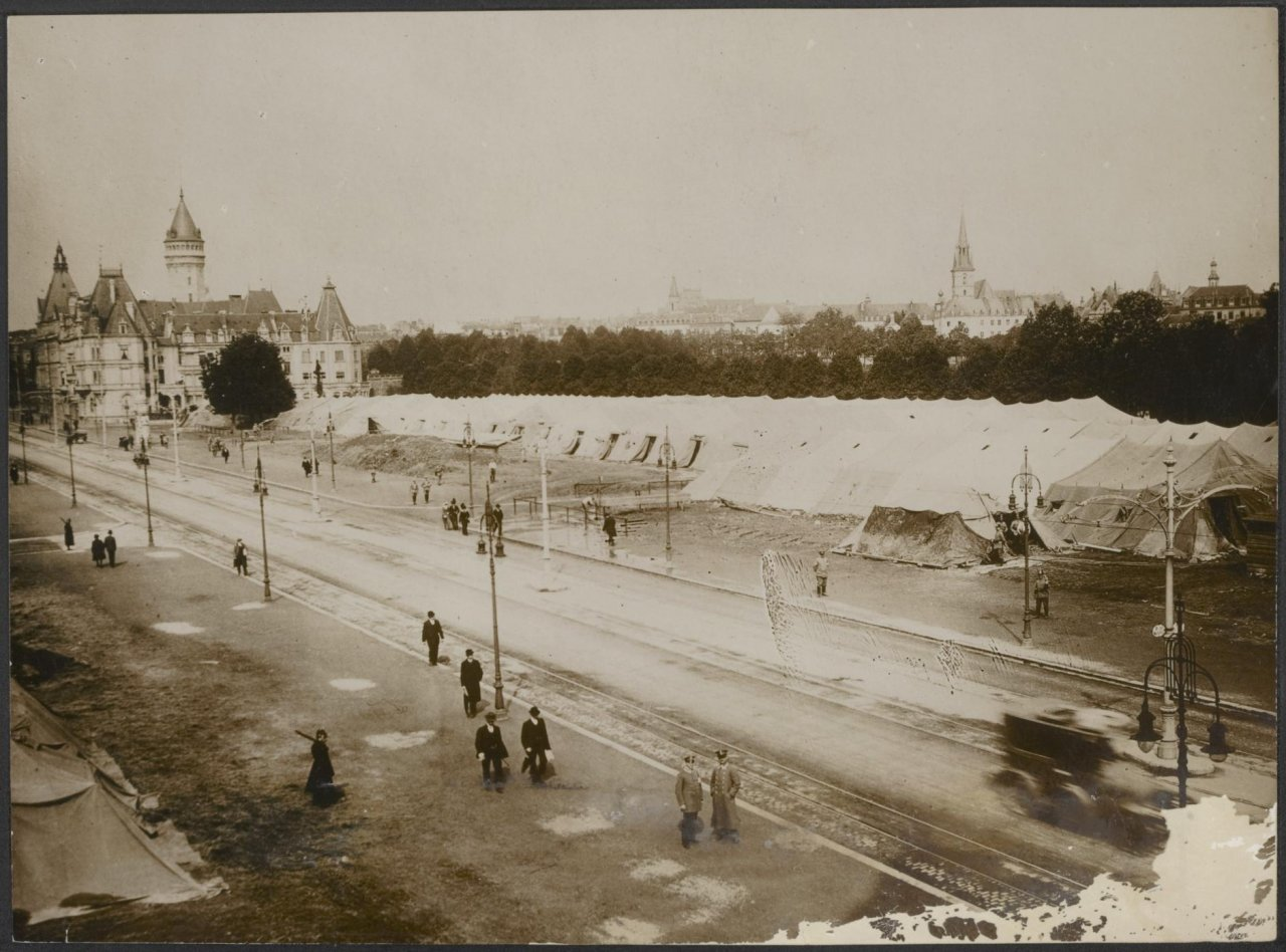 Tentenkamp te Luxemburg waar de Duitsche Keizer [Wilhelm II] thans verblijf houdtLëtzebuergesch: Zeltlager an der Stad Lëtzebuerg wéi den däitsche Keeser Wilhelm II. do war. D'Zelter stoungen op där Plaz laanscht d'Nei Avenue, wou haut d'Arbeds-Gebai steet.